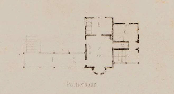 Grundriss des Pförtnerhauses am Böttcherberg, Veröffentlichung 1852